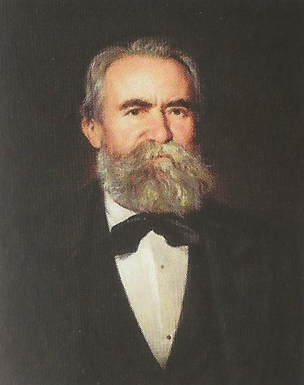 Porträt von Hermann Blodig (1822–1905), im Studienjahr 1870/71 Rektor des k.k. Polytechnischen Institutes Wien